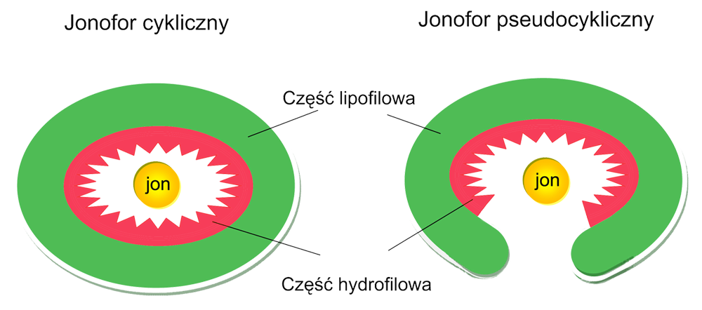 Schemat jonoforu cyklicznego i pseudocyklicznego